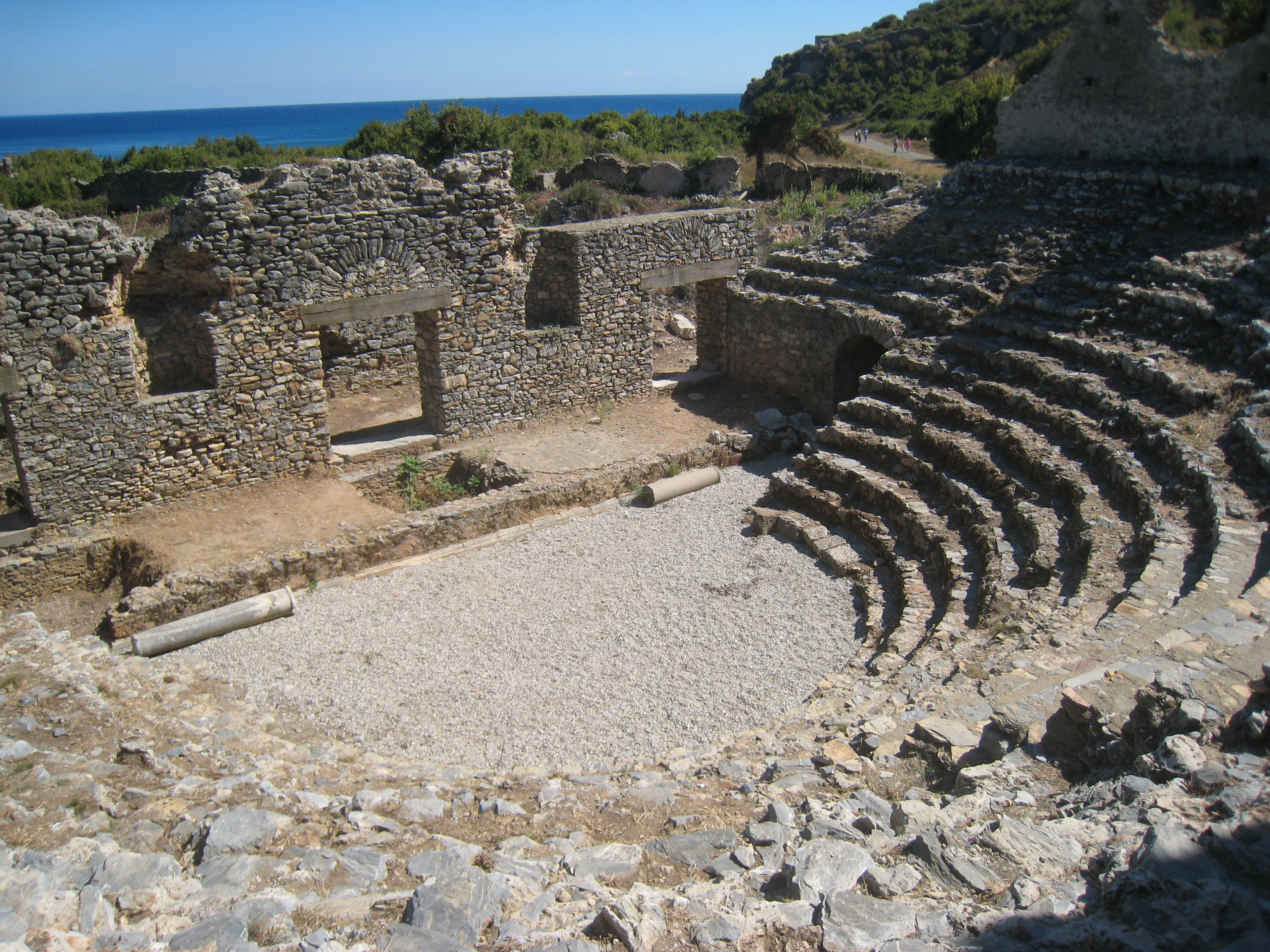 Opernhaus in Anamurium